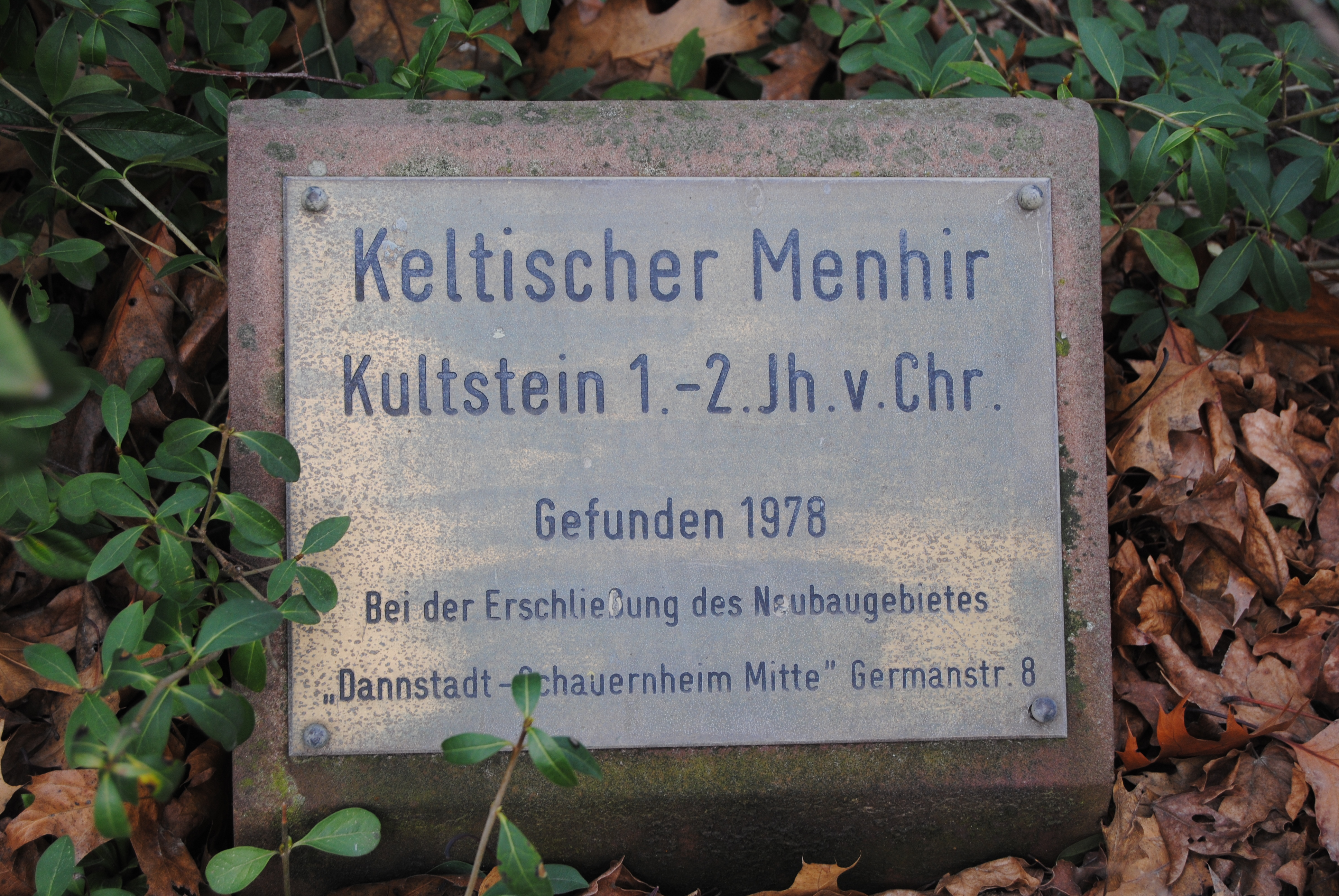 Tafel des Langen Steins (Menhir) im OT Schauernheim der Gemeinde Dannstadt-Schauernheim in Rheinland-Pfalz